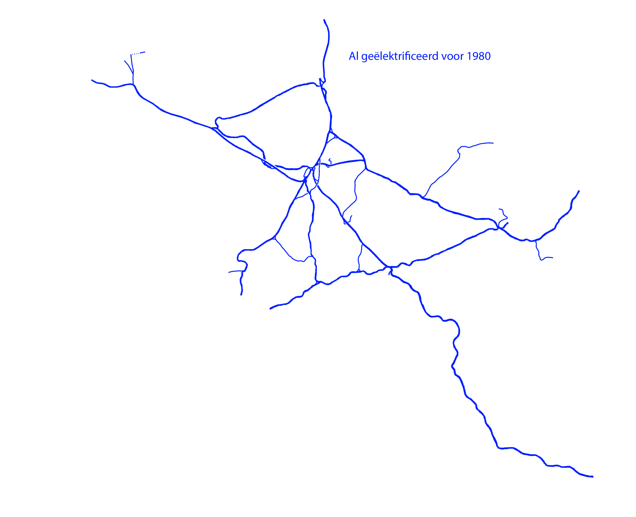 Spoorkaart waarbij alle geelektrificeerde spoorlijn van voor 1980 zijn ingetekend.